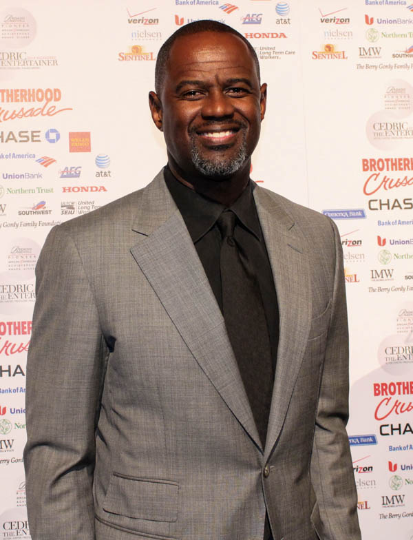 By Ashley Velez